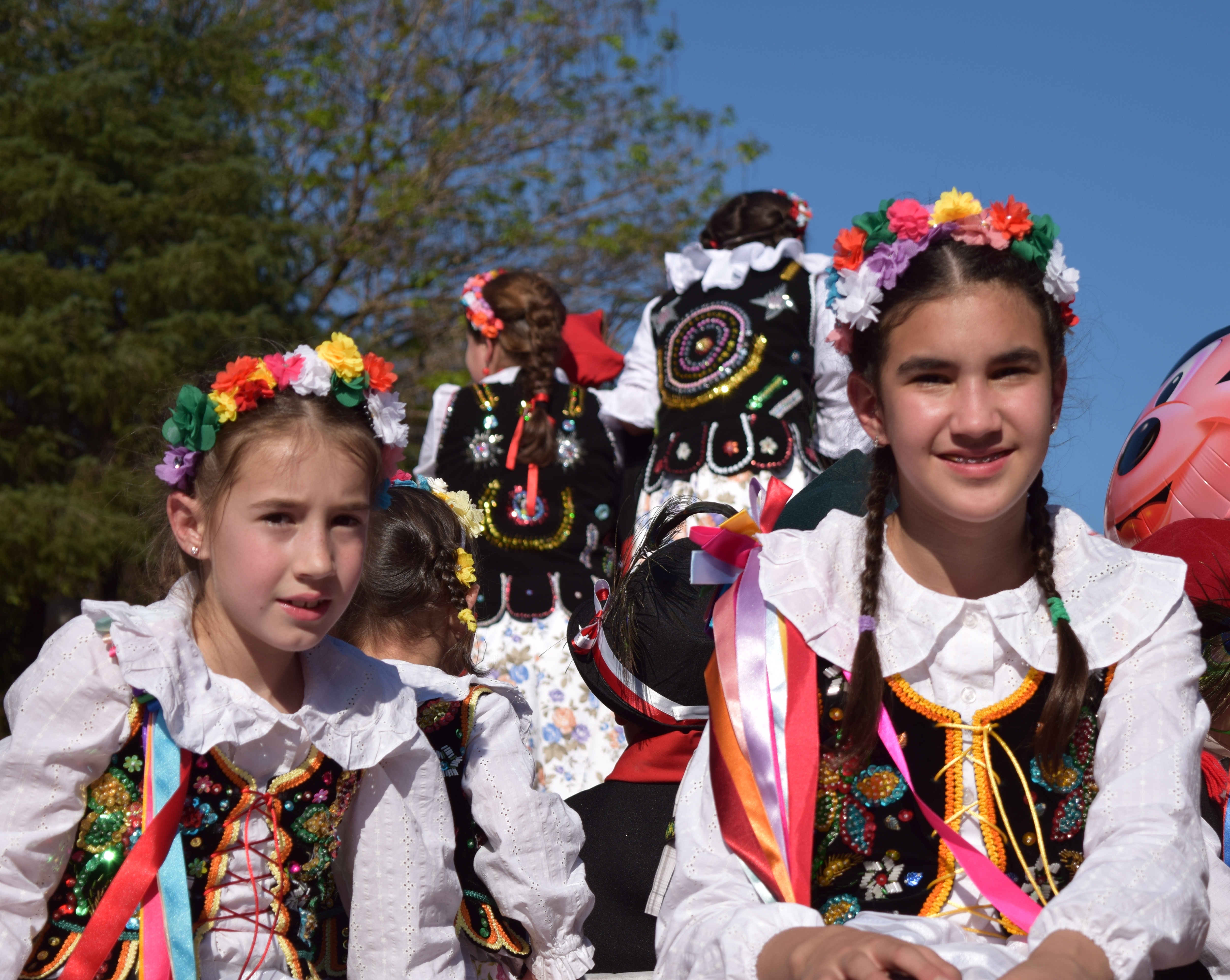 Desfile inaugural de la XXXV Fiesta Nacional del Inmigrante realizada en Septiembre de 2014 en Oberá, provincia de Misiones, Argentina.